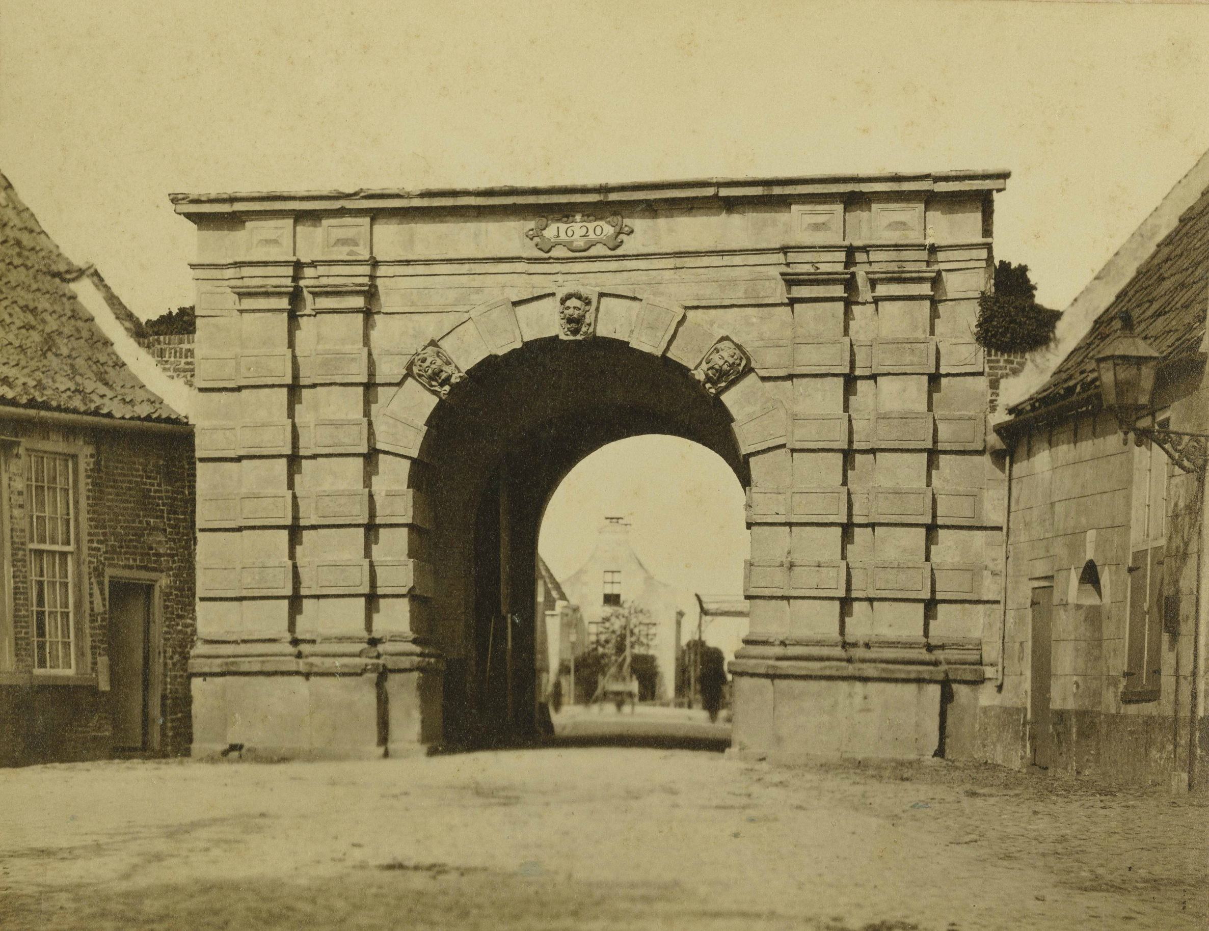 De Steentilpoort in 1874. Dit is een aangepaste versie van het origineel. Achter de poort zijn een stel bomen uitgewist.